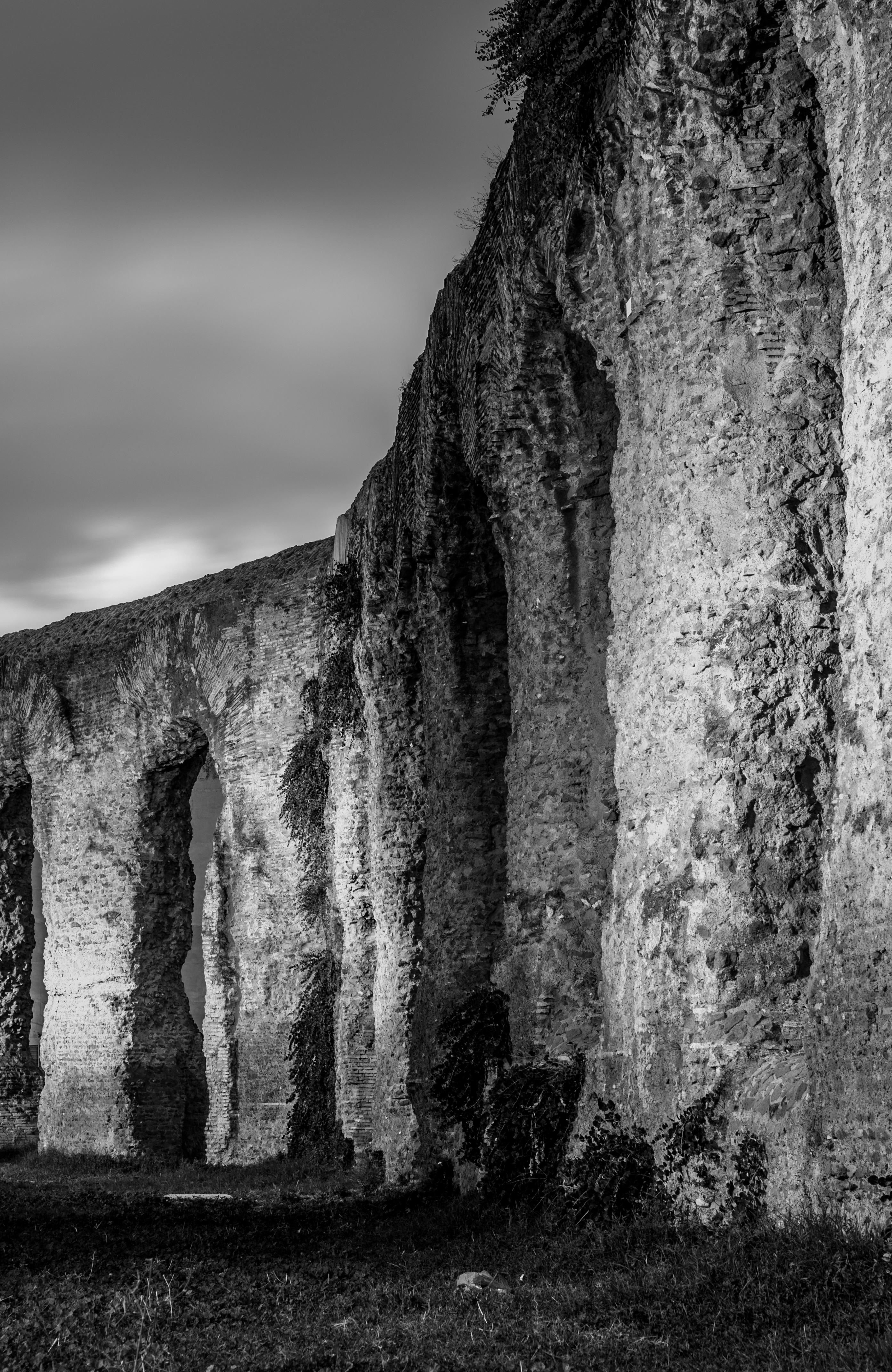 Acquedotto Alessandrino This is a photo of a monument which is part of cultural heritage of Italy.